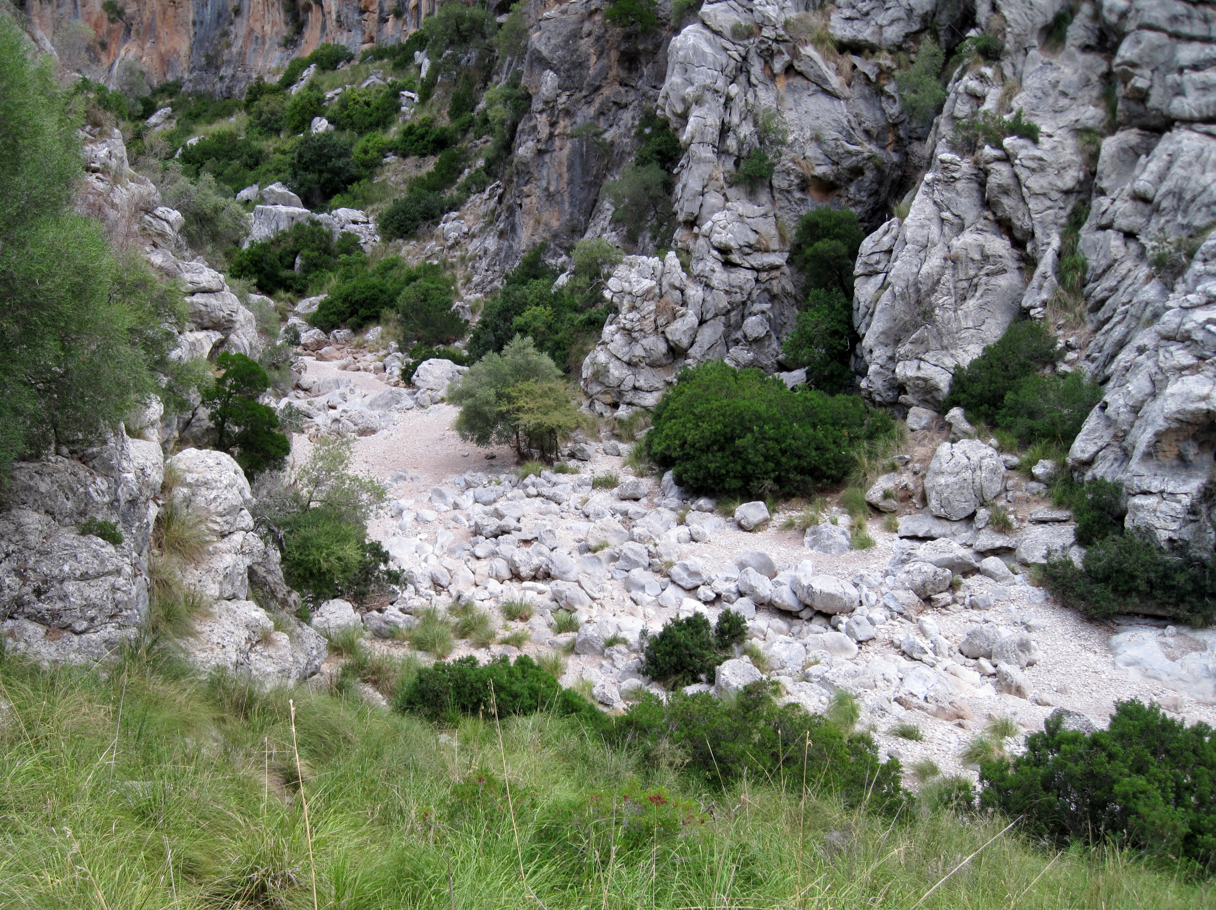 Blick über das Tal des Torrent de Lluc, Gemeinde Escorca, Mallorca, Spanien